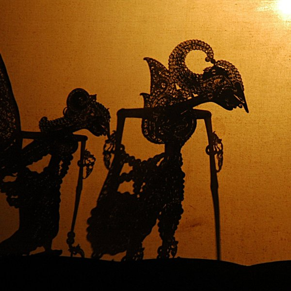 Wayang kulit performance, Museum Wayang, Jakarta -- photograph by jpatokal